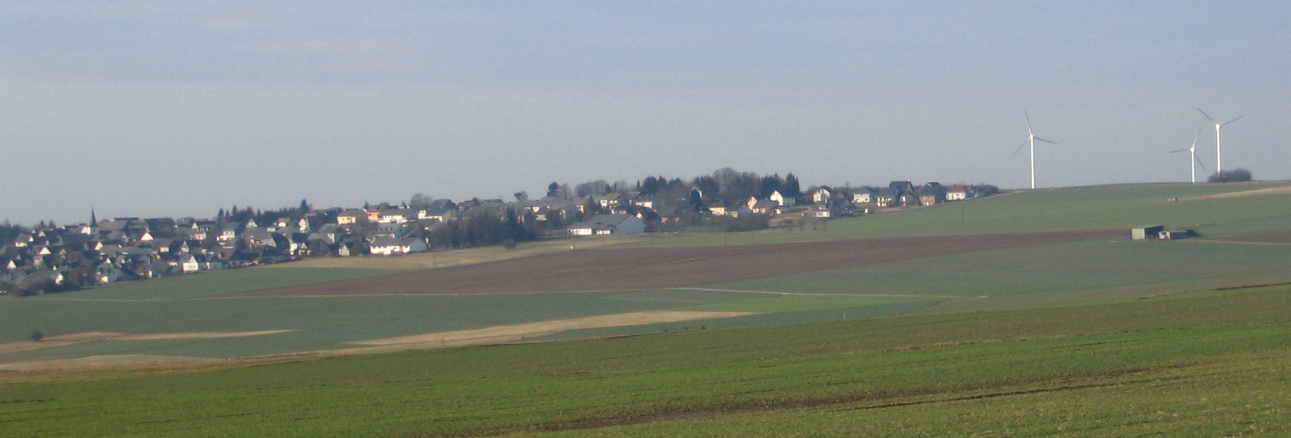 Beltheim, Hunsrück, Germany